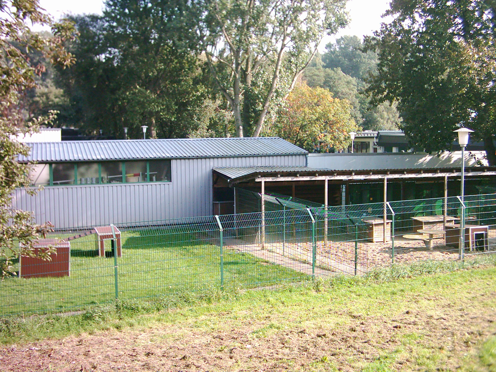 Hundezwinger des Hamburger Tierschutzvereins in der Süderstraße in Hamburg-Hamm. Siehe auch Image:Tierheim Süderstraße - Hundezwinger06.jpg.